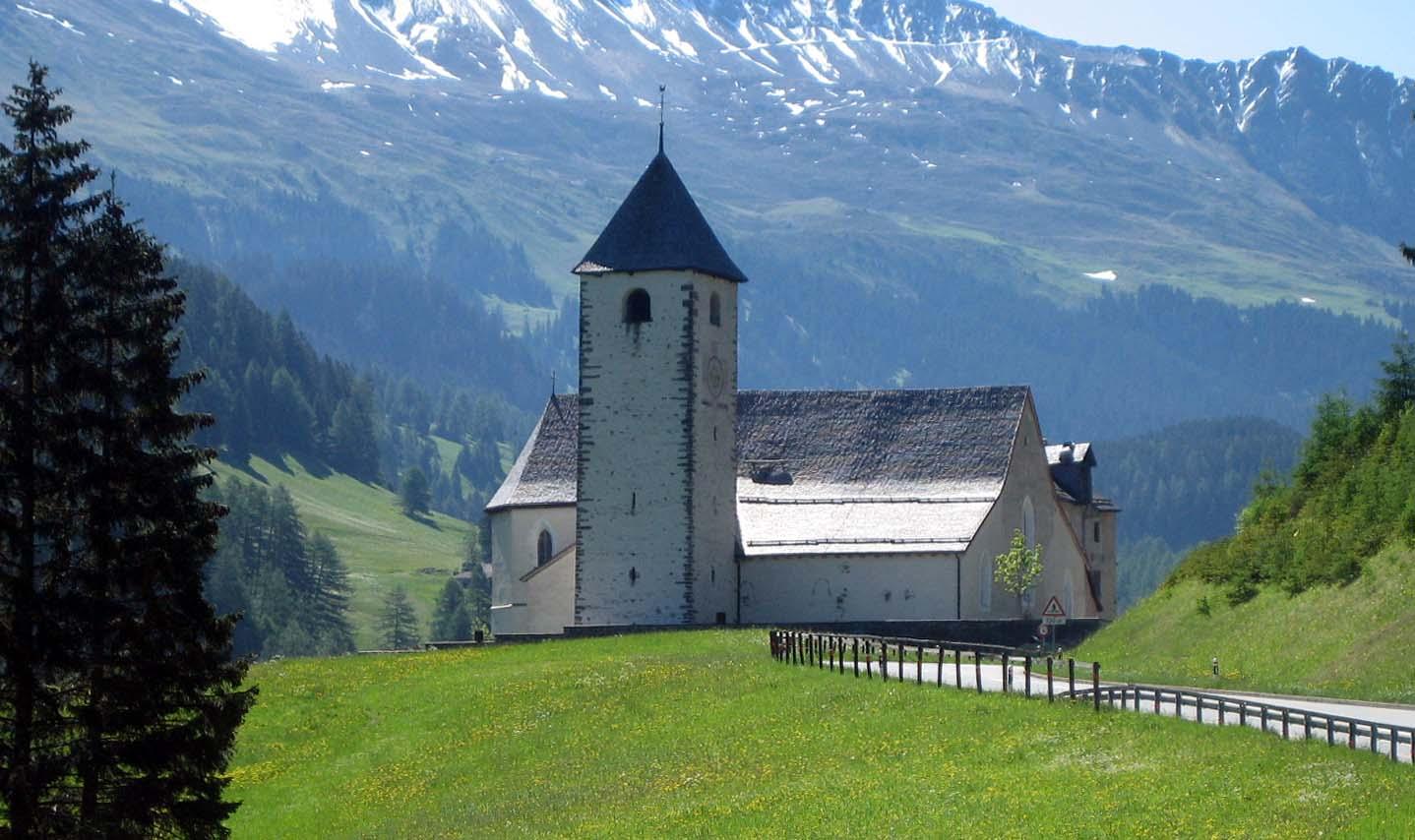 Kirche St. Maria und Michael in Churwalden